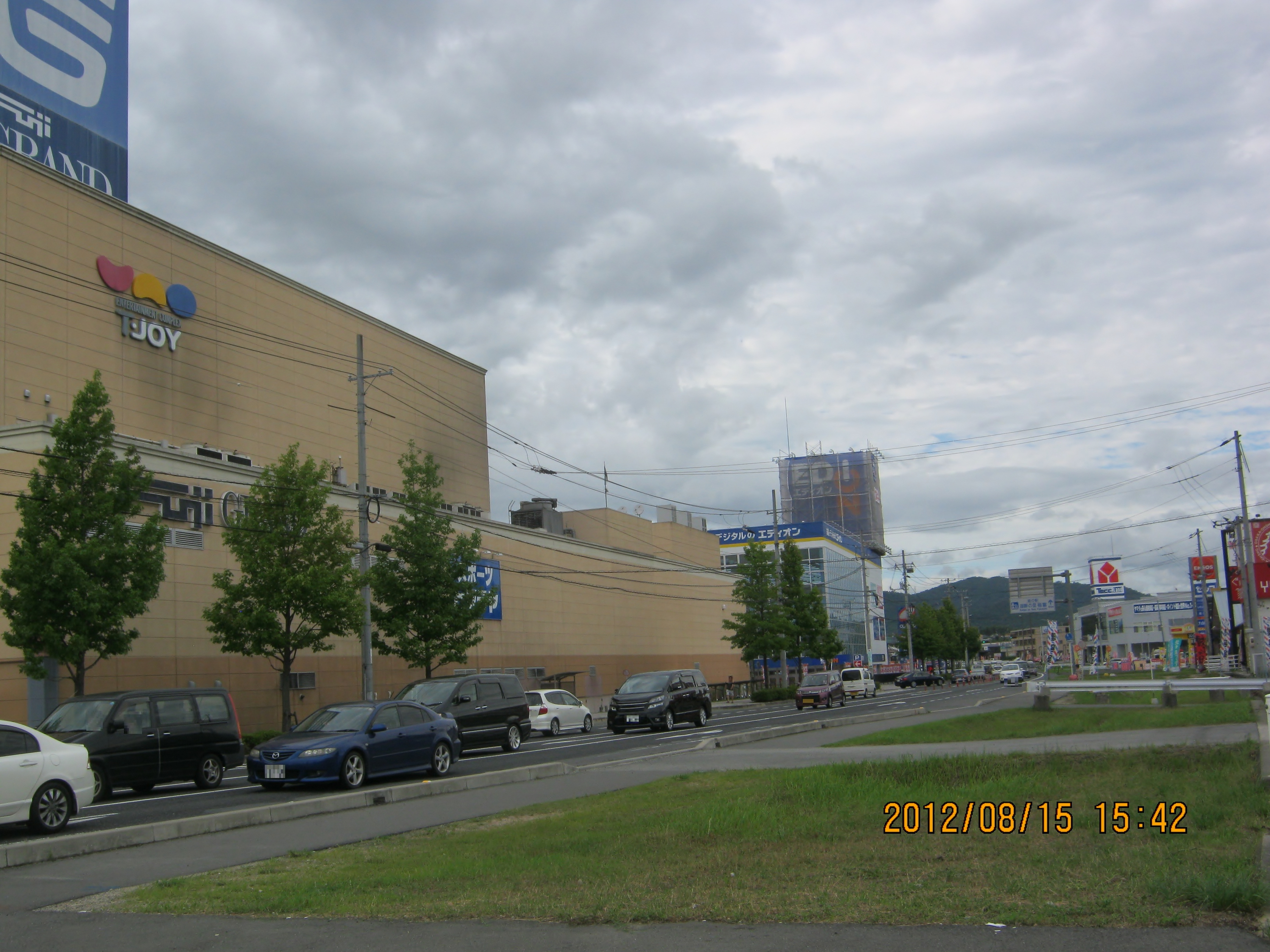 フジグラン東広島付近から北方面を写した写真